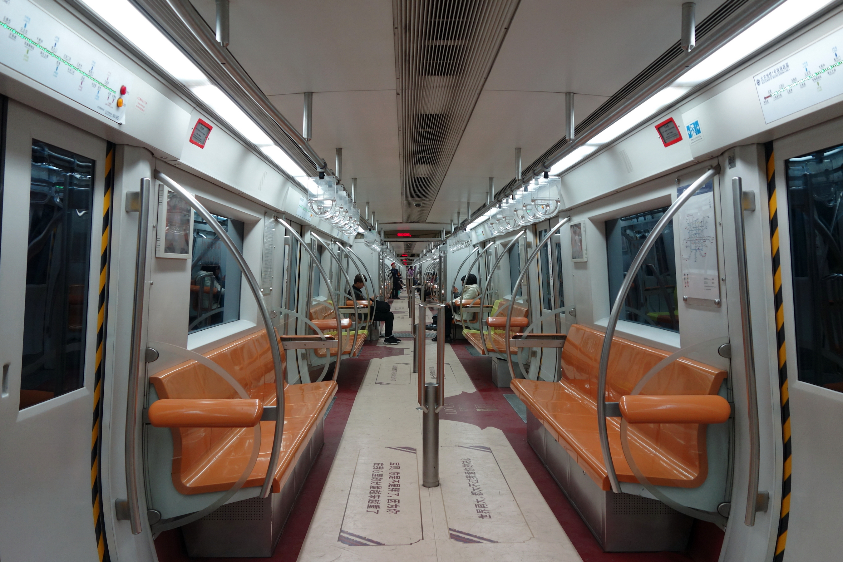 北京地铁1号线列车内部